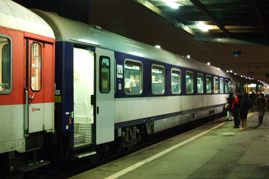 Poznań Główny, wagon 152Az w pociągu EN Jan Kiepura